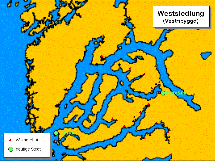 Karte der Westsiedlung der Wikinger auf Grönland